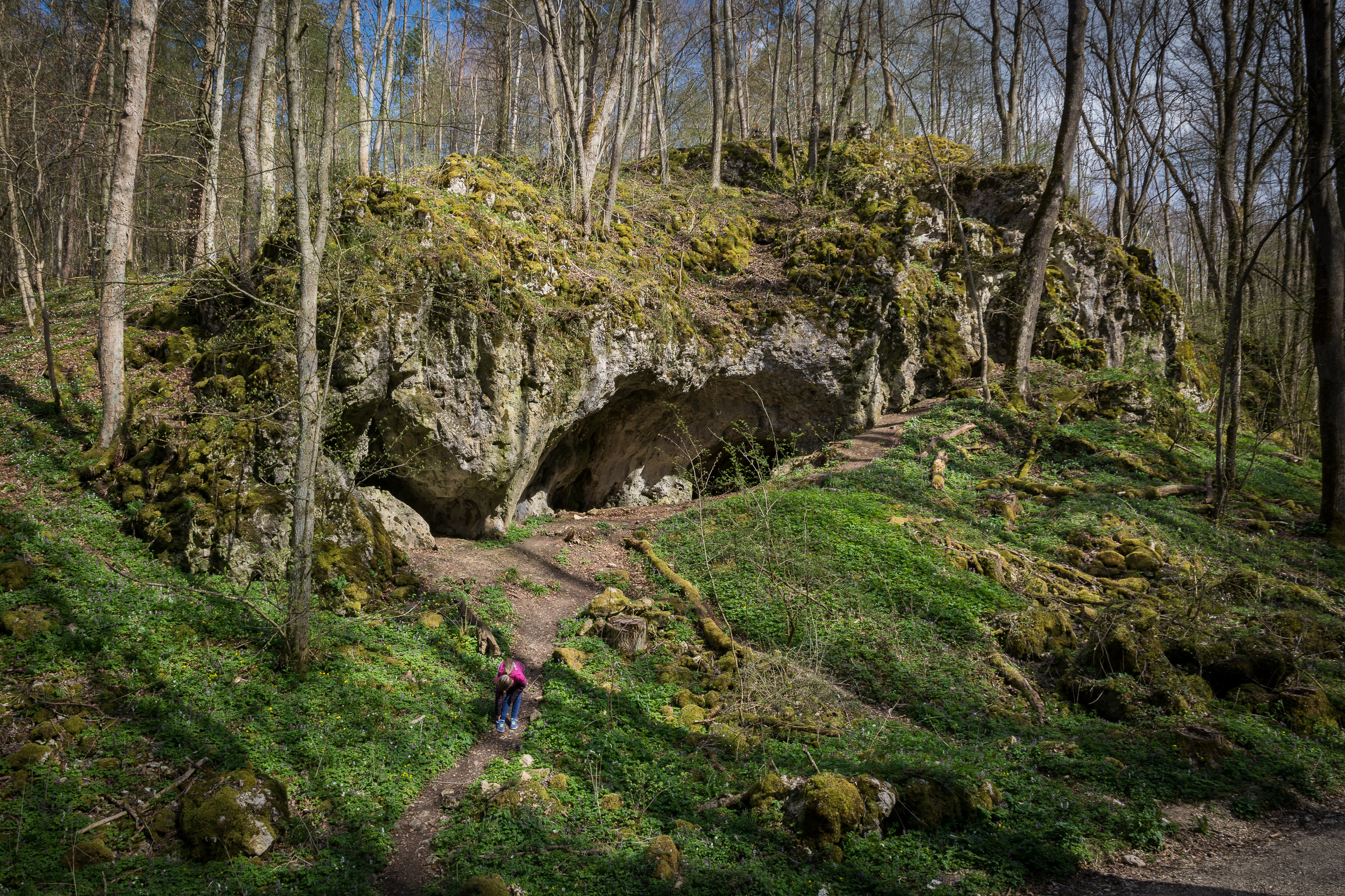 Die Spitzbubenhöhle bei Eselsburg. In der Bildmitte, von links nach rechts: Nördlicher Eingang, Abri, südlicher Eingang.